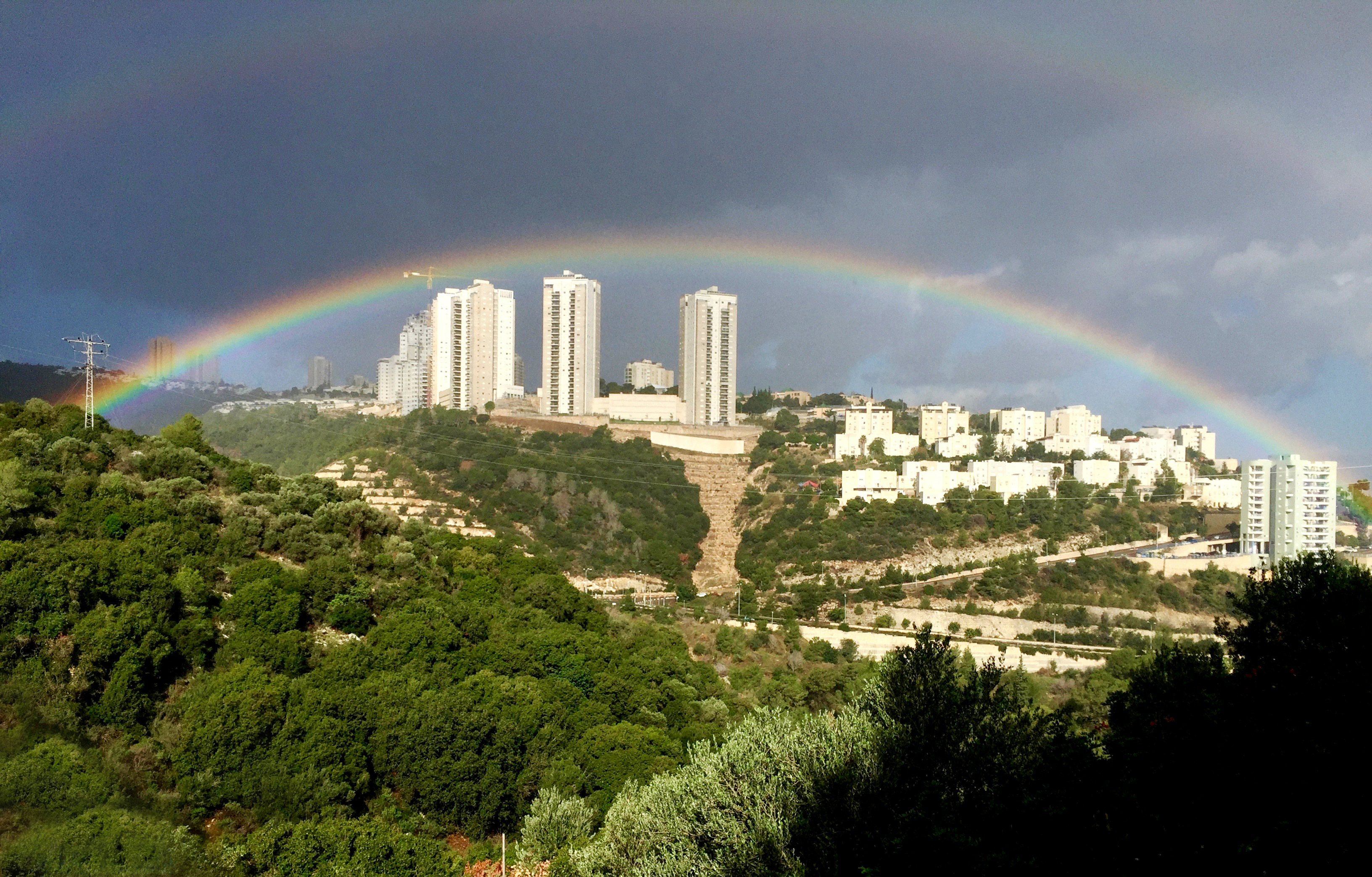 קשת בענן מעל שכונת רמות יצחק בעיר נשר. מתחת לשכונת רמות יצחק עובר כביש 705. התמונה צולמה משכונת גבעת נשר